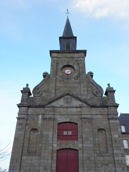 Chapelle de l'ancien grand-séminaire de Dol-de-Bretagne (35).